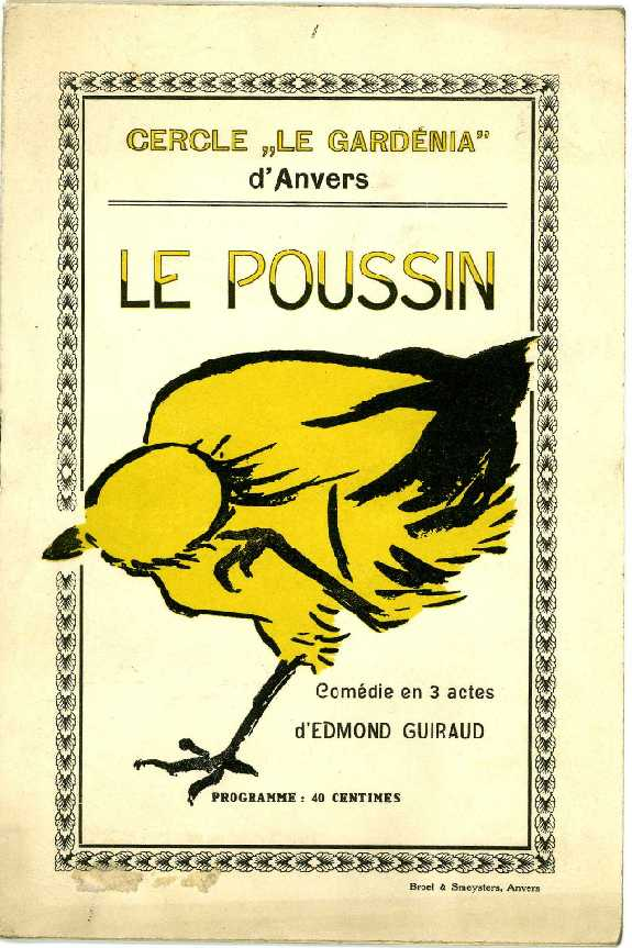 Couverture d'un programme pour une pièce de théâtre de Edmond Guiraud: Le Poussin, par Benjamin Rabier